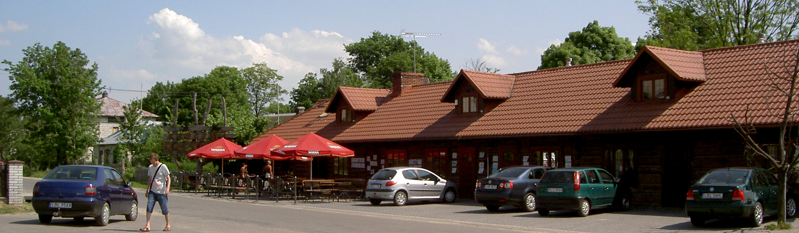 Obsza, Poland • Centrum wsi / Village centre